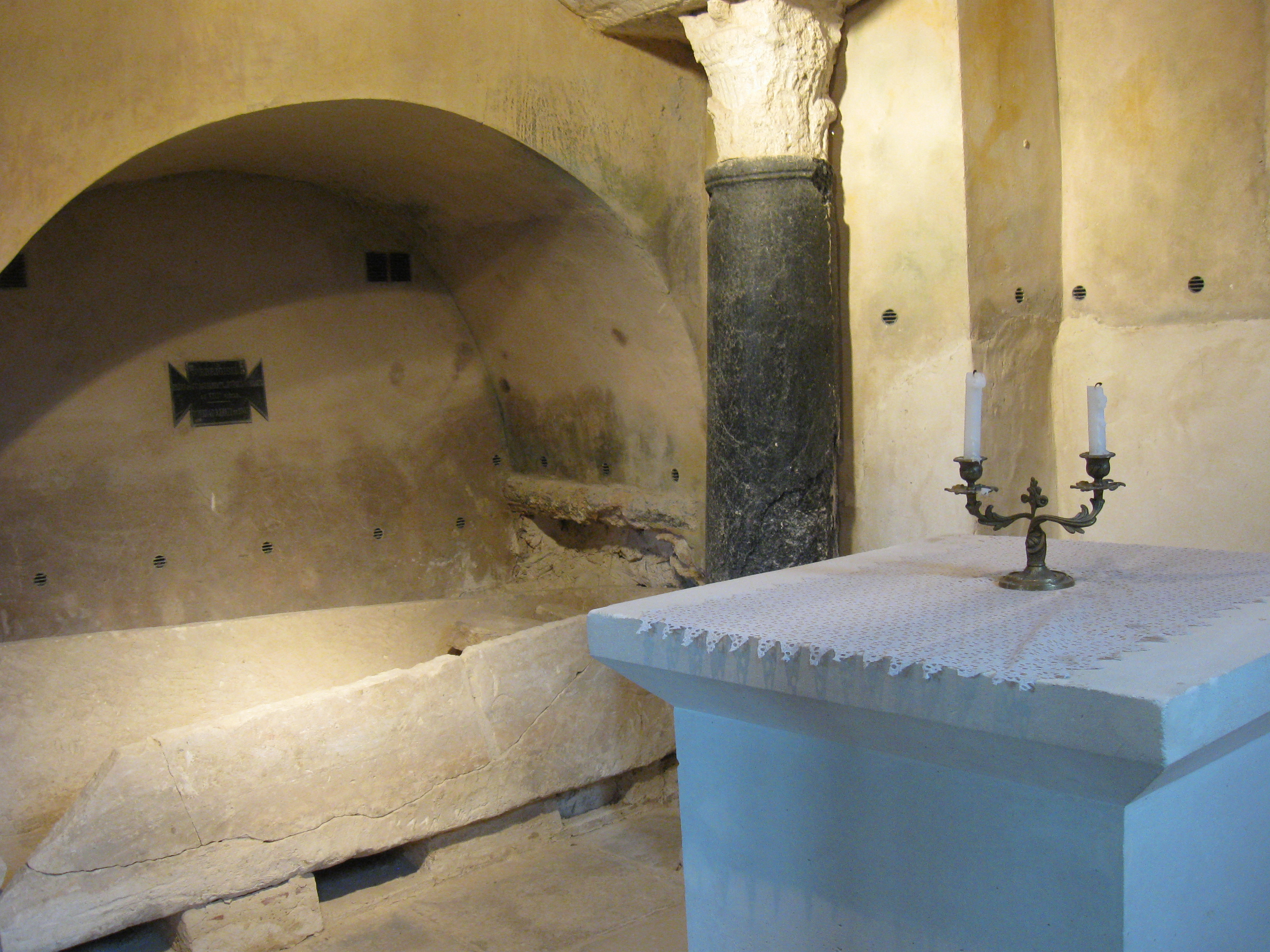 Crypte Saint-Ebrégésile, Jouarre. (Seine-et-Marne, région Île-de-France).